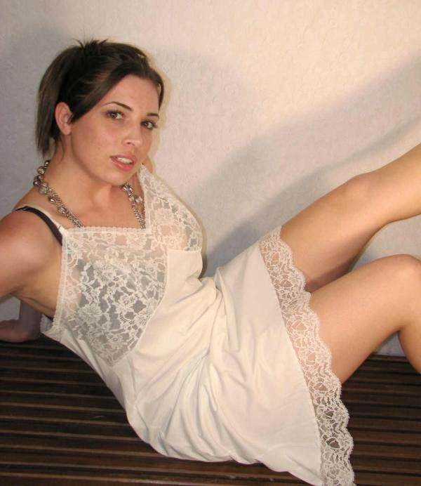 Selfmade image